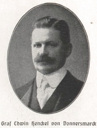 Edwin Henckel von Donnersmarck (1865-1929) deutscher Graf, Preussischer Landtagsabgeordneter (Zentrum)